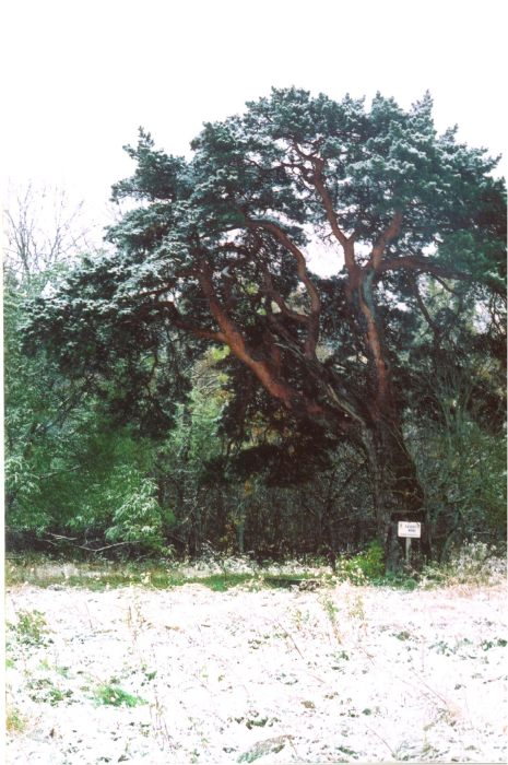 Käharpea mänd